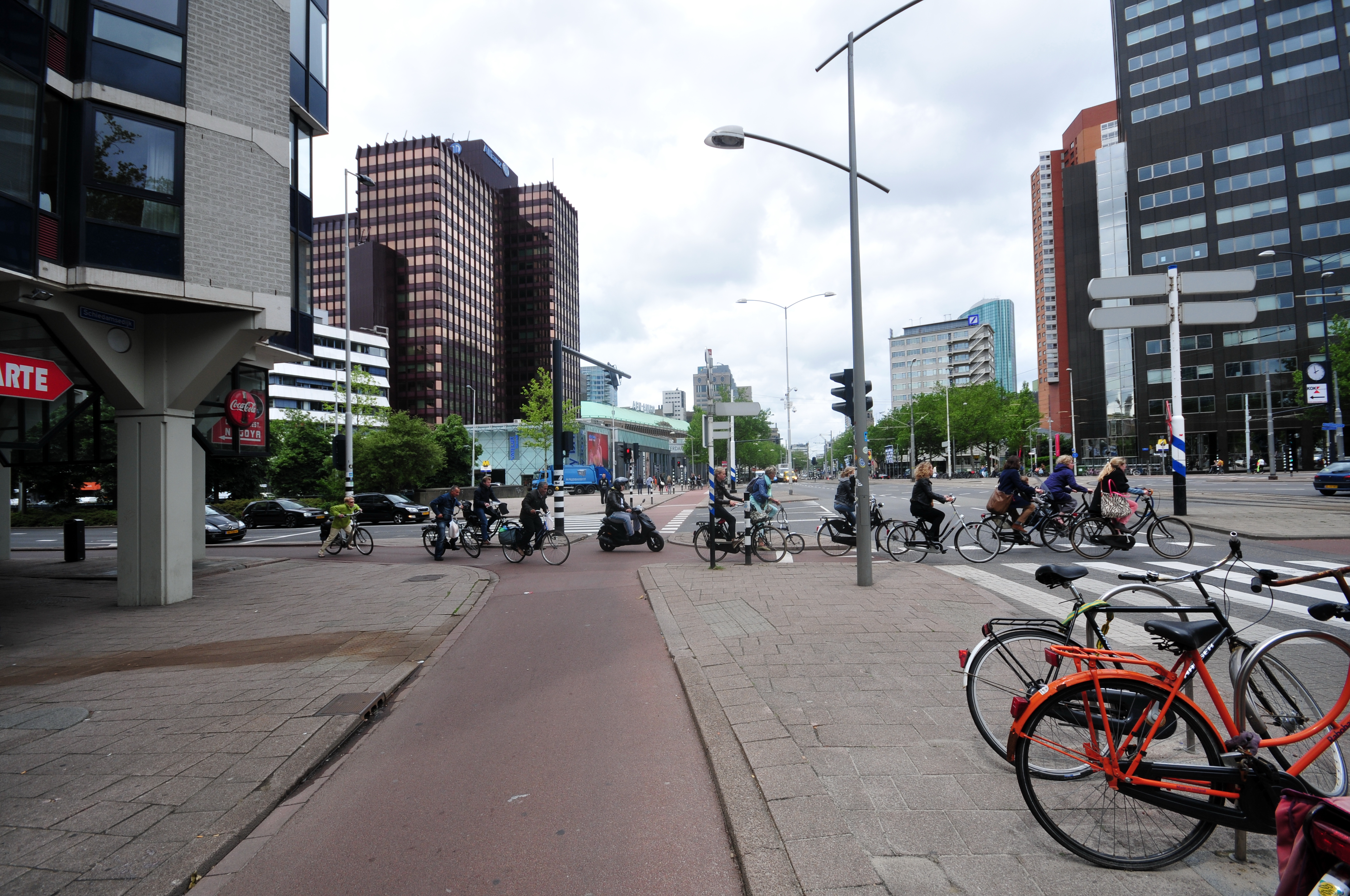 Rotterdam, Niederlande, 2013